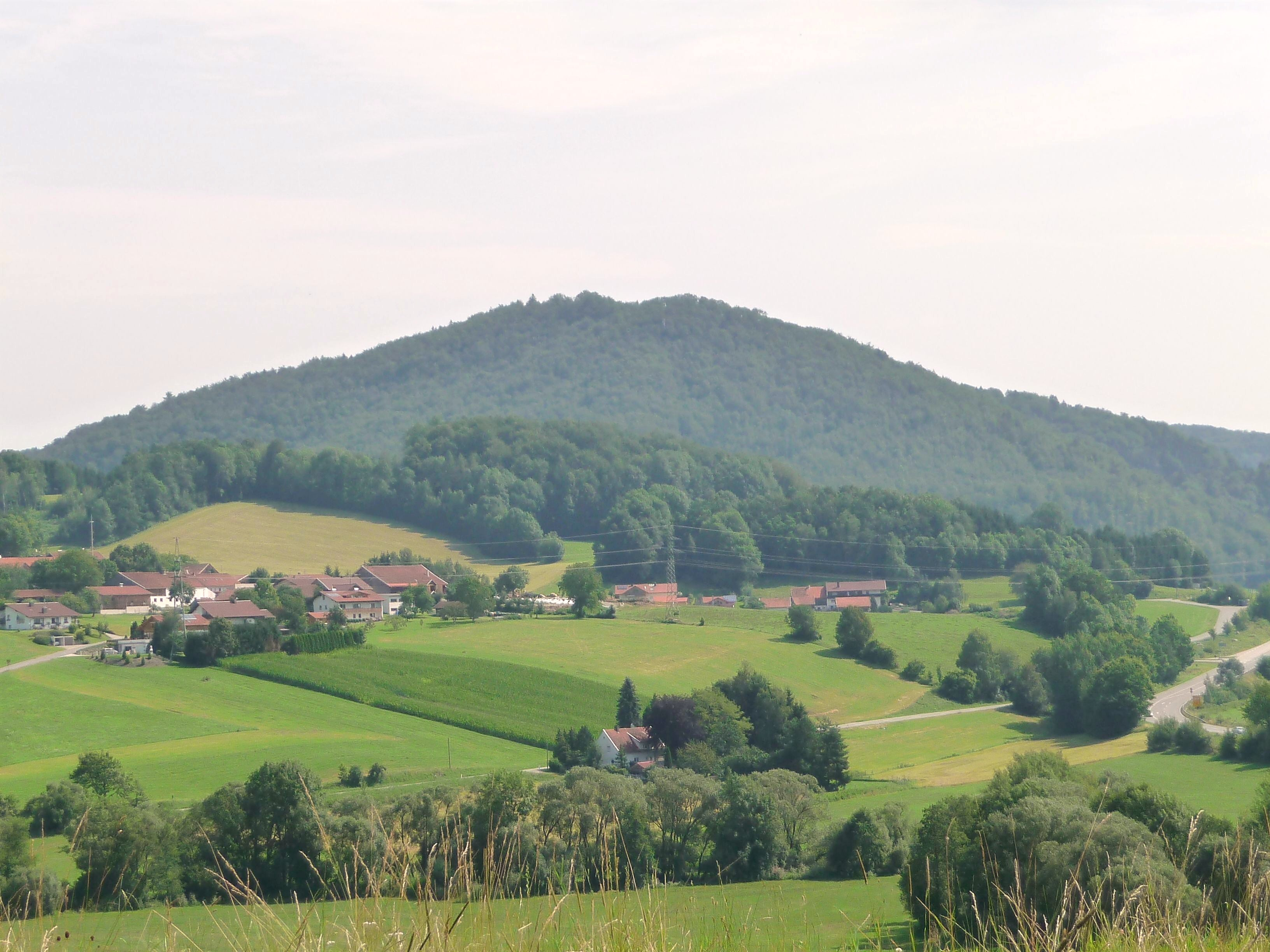 Der Frauenberg bei Grafenau von Schönberg aus gesehen